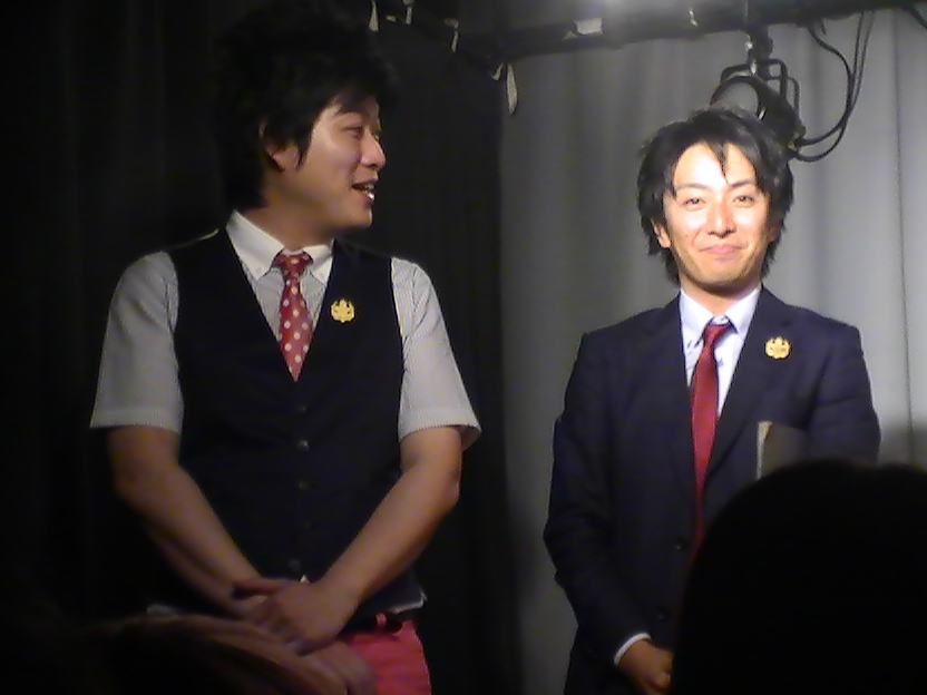 湘南デストラーデ (2016年5月)